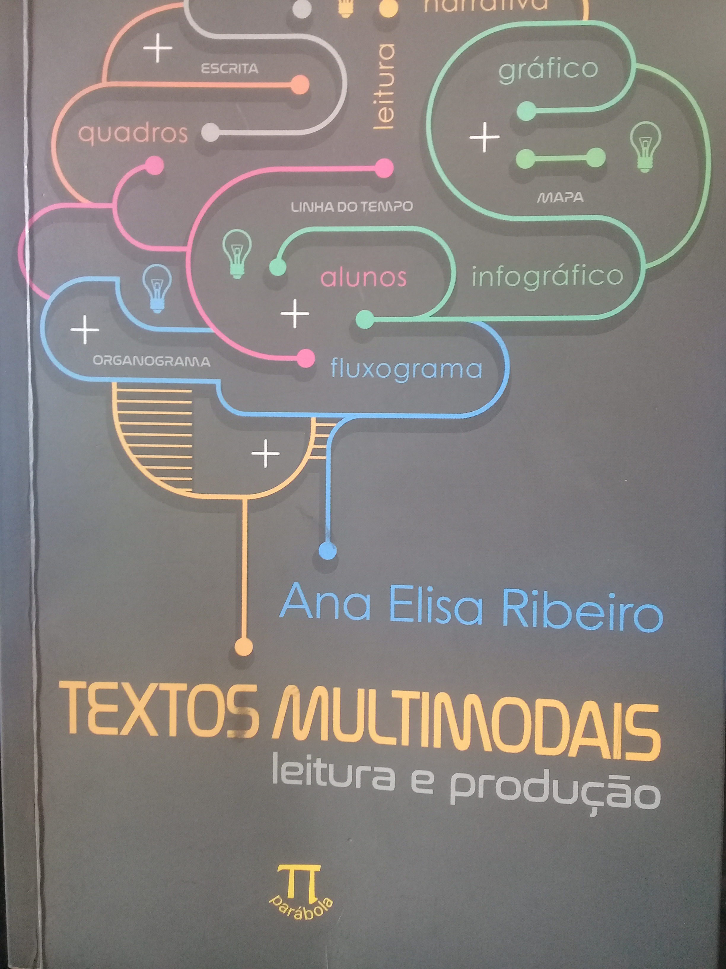 Foto capa colorida livro textos multimodais